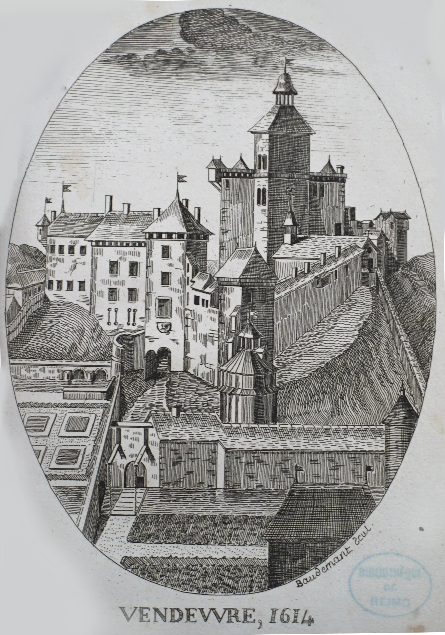 reproduction d'une vue du chateau. Publié en 1812 par Sainton.